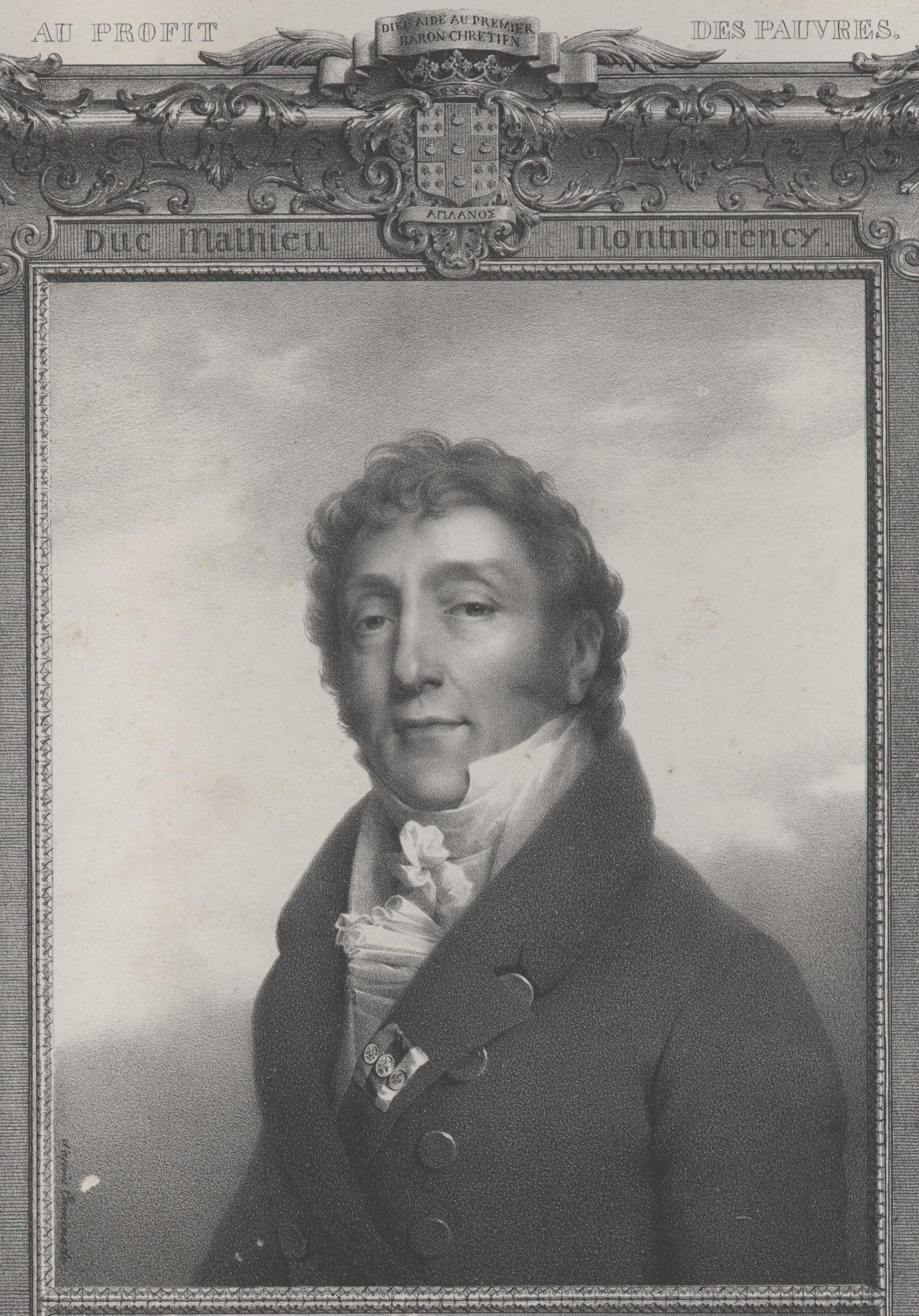 Mathieu Jean Félicité de Montmorency-Laval (1767-1826), französischer Außenminister